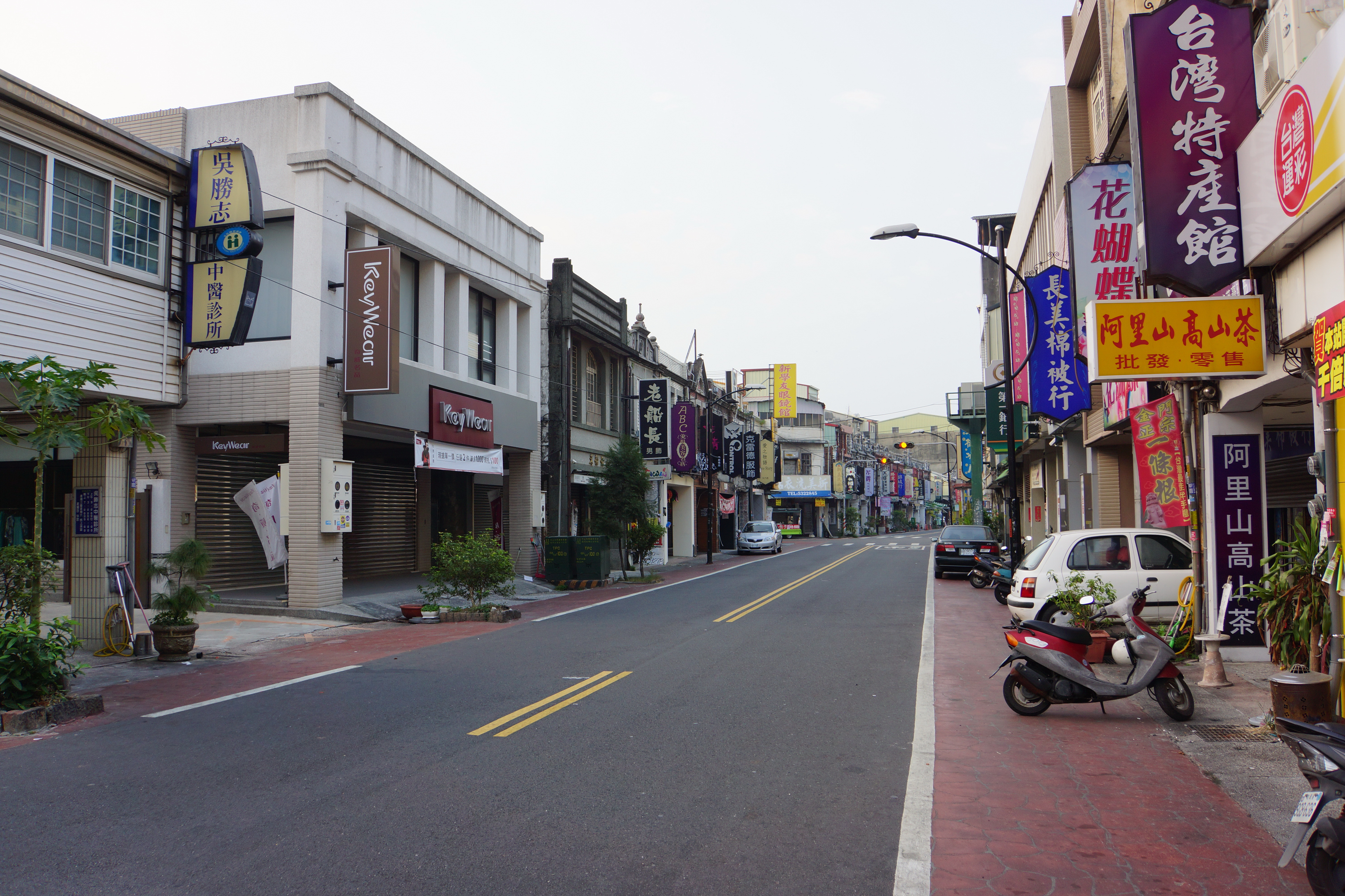 Douliu Taiping Road 斗六太平路